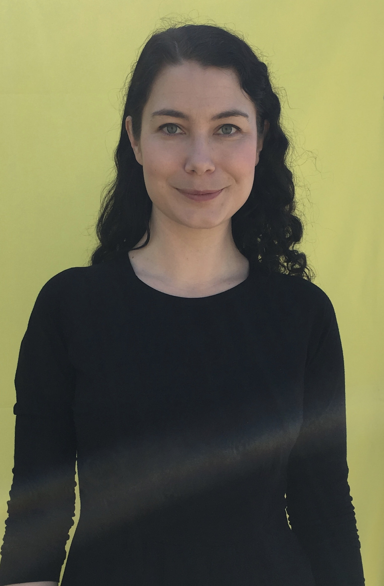 Kansanedustaja Emma Kari Maailma kylässä -festivaaleilla.